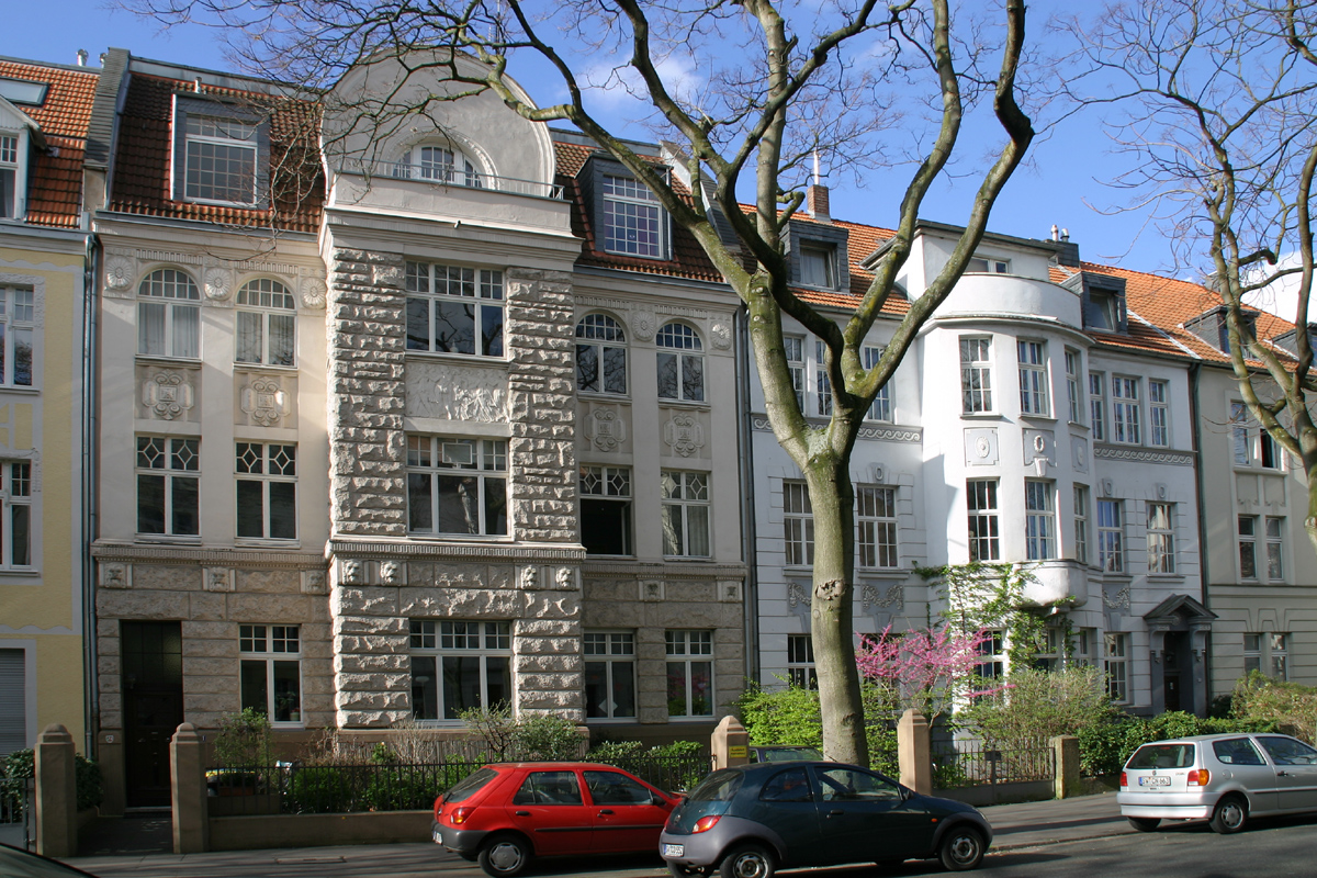 Eichendorfstraße Köln, denkmalgeschützte Häuser